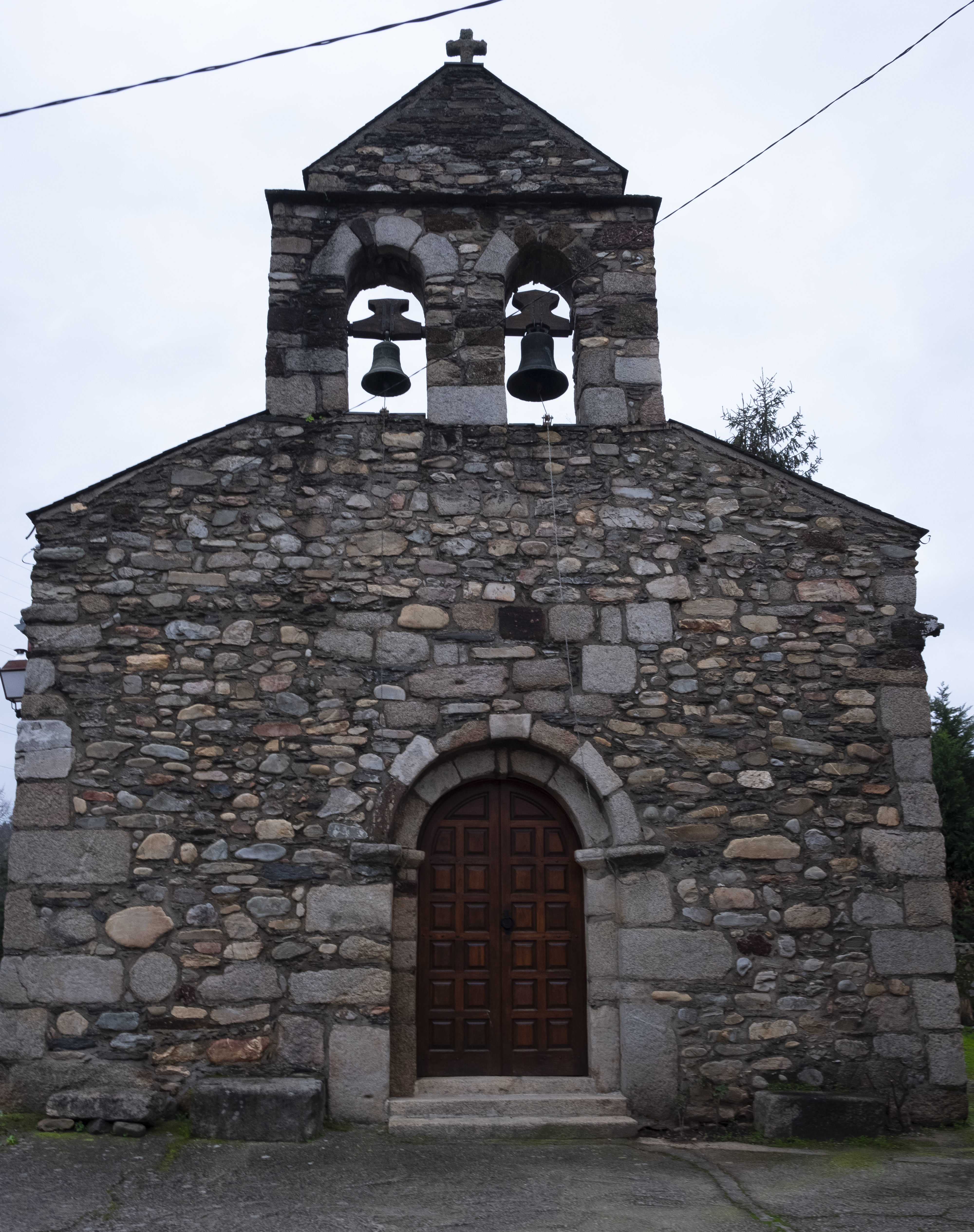 Igrexa parroquial de A Proba, no concello de O Barco de Valdeorras